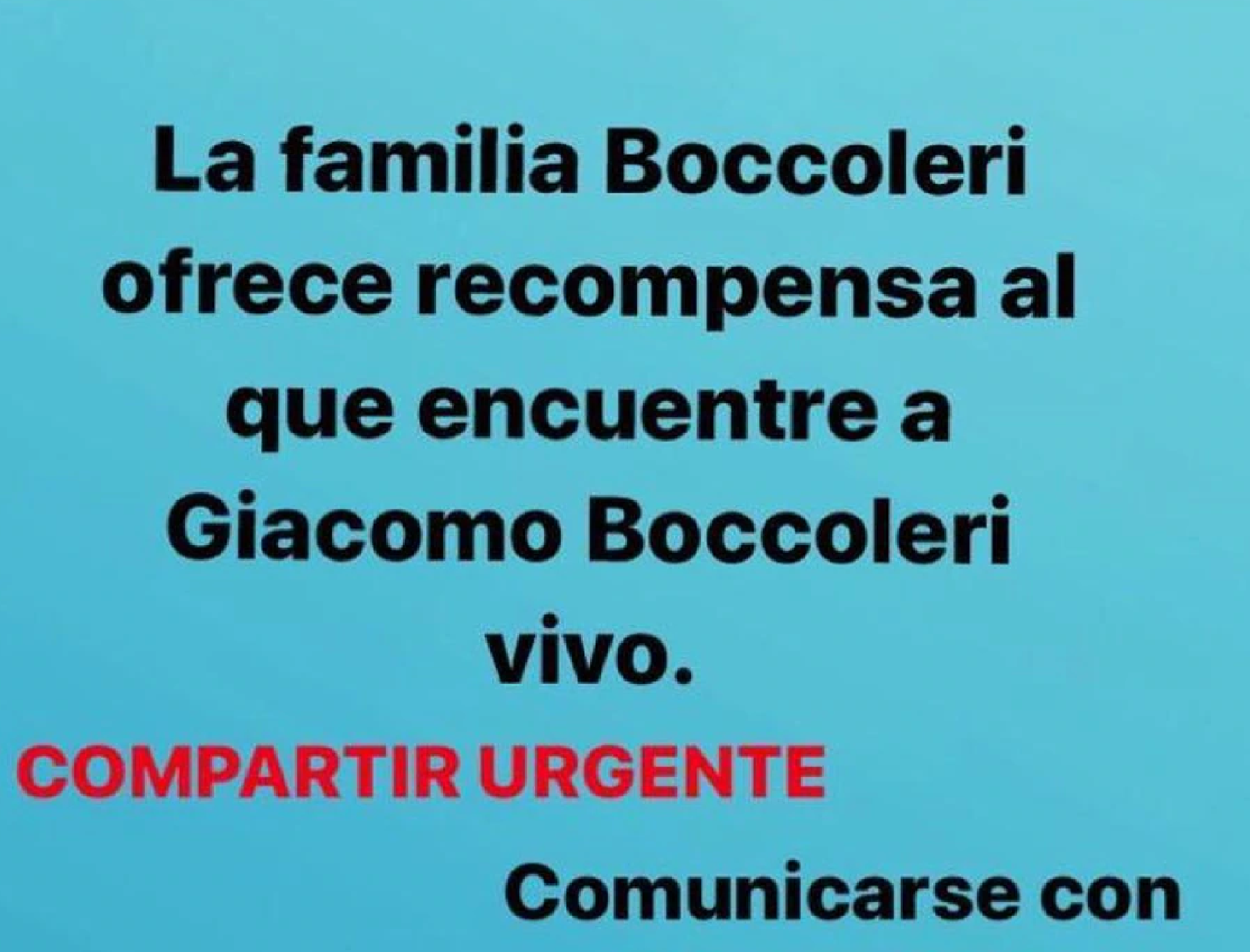 Recorte de los pedidos de busqueda de Giacomo Boccoleri